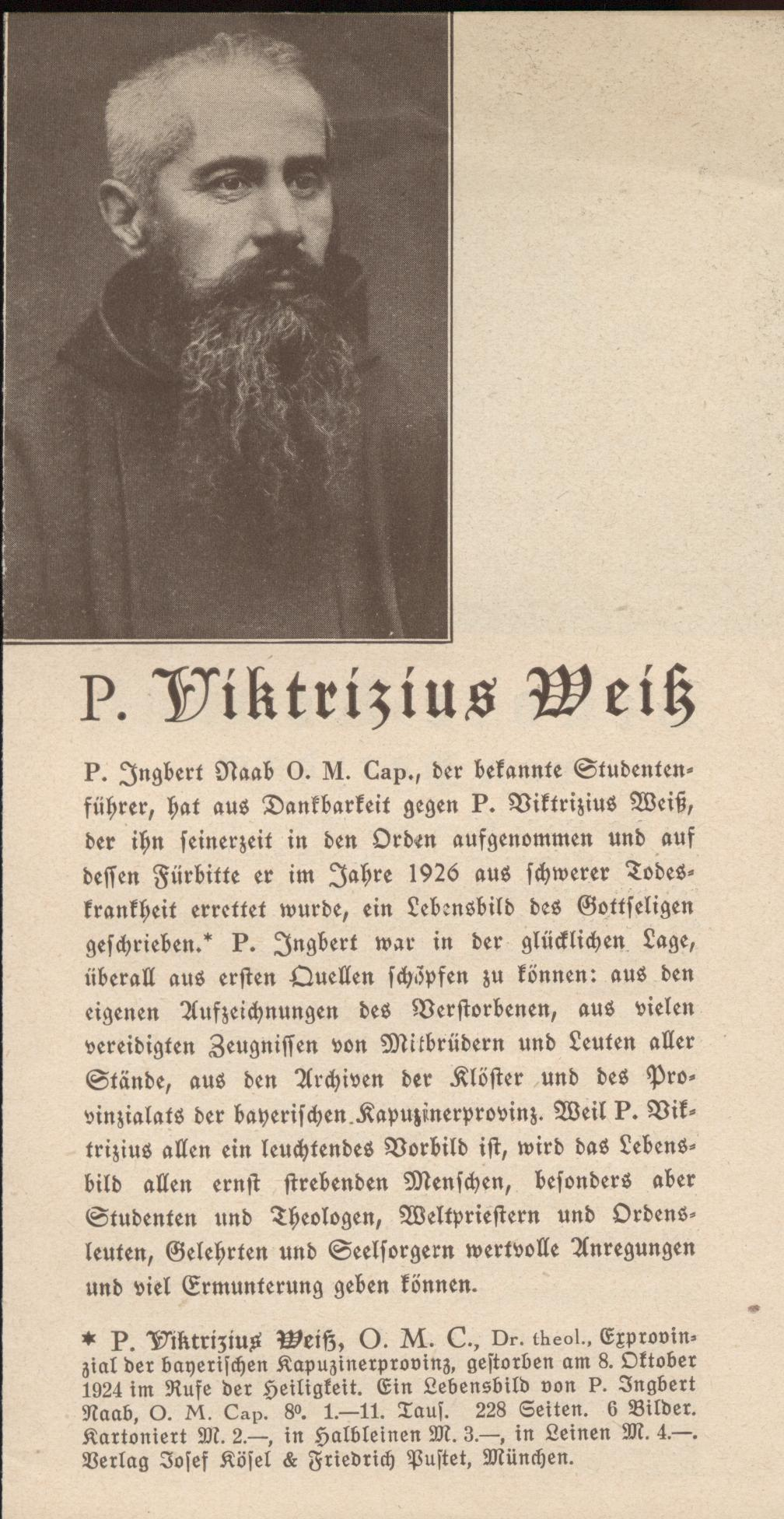 Pater Ingbert Naab, Werbezettel für eines seiner Bücher